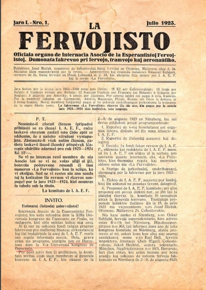 Lafervojisto kovrilo Julio 1923